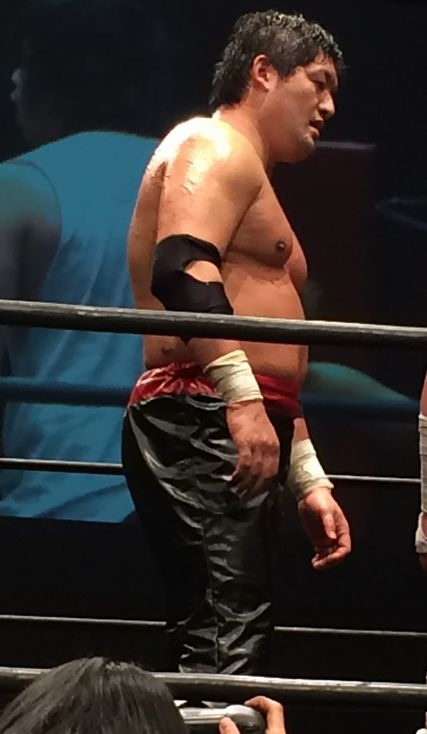 ジャイアント